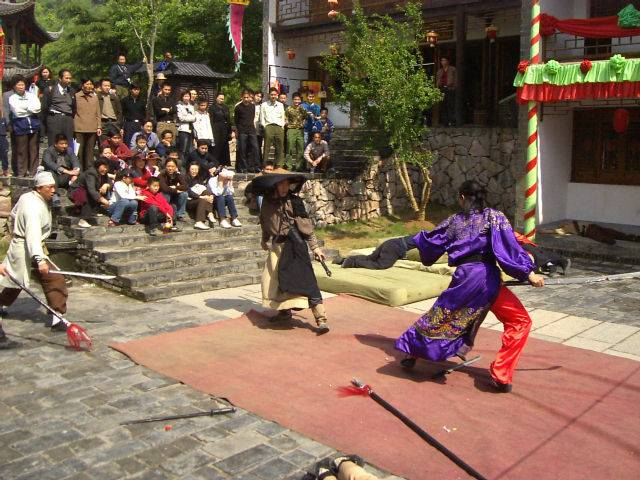 南京明文化村 武侠劇 2004年5月4日撮影 撮影者:権作 参照：